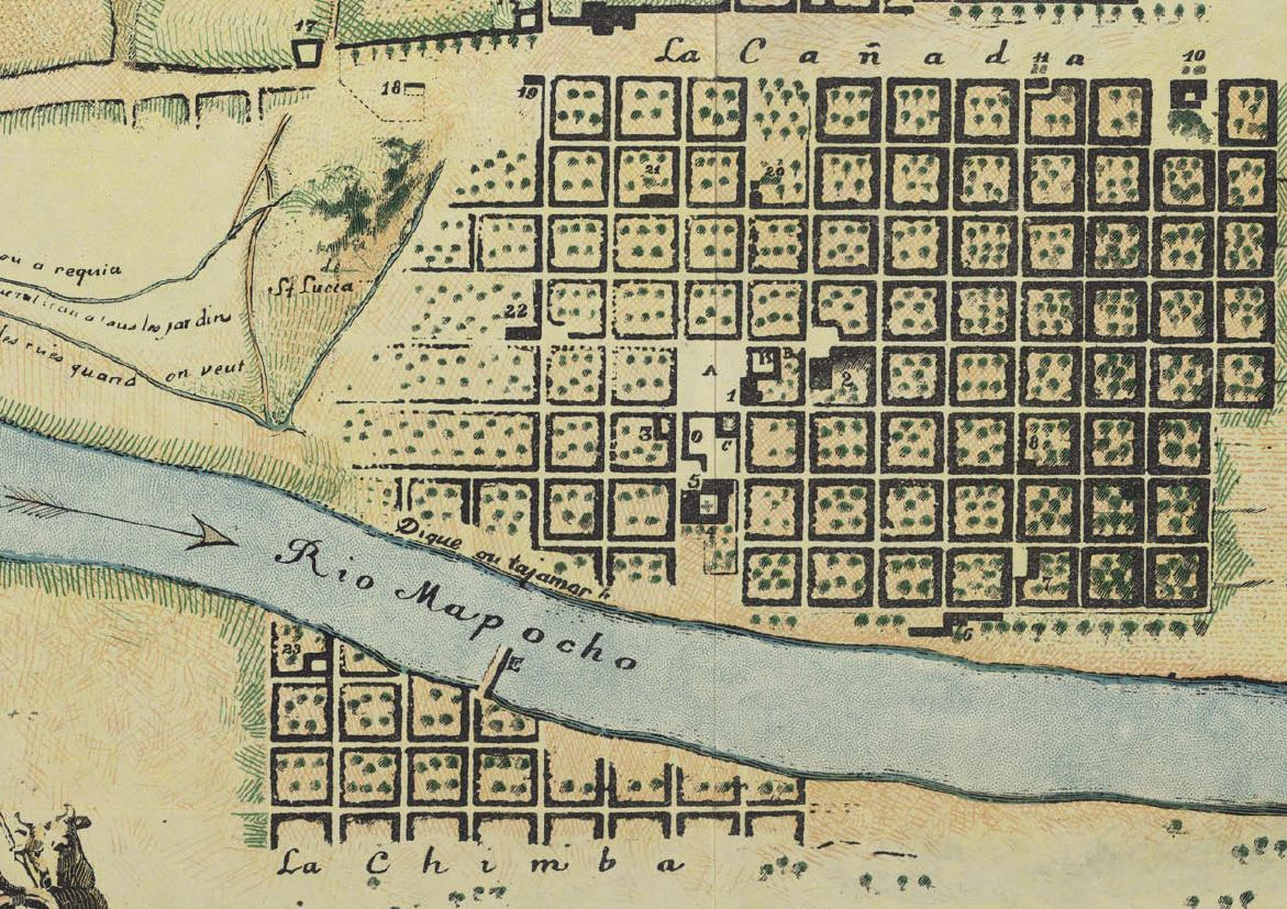 La Chimba en Plan de la ville de Santiago, mapa de Santiago de Chile durante el siglo XVIII. En la esquina inferior dice: Plan de la Ville de Santiago Capitale du Royaume de Chili Située par 33d. de Latit de Australe a 28 Lieues du Port de Valparaiso dans la Mer du Sud Echelle de 500 Toises En la esquina superior: Vue de la Petite Montagne de Ste. Lucie